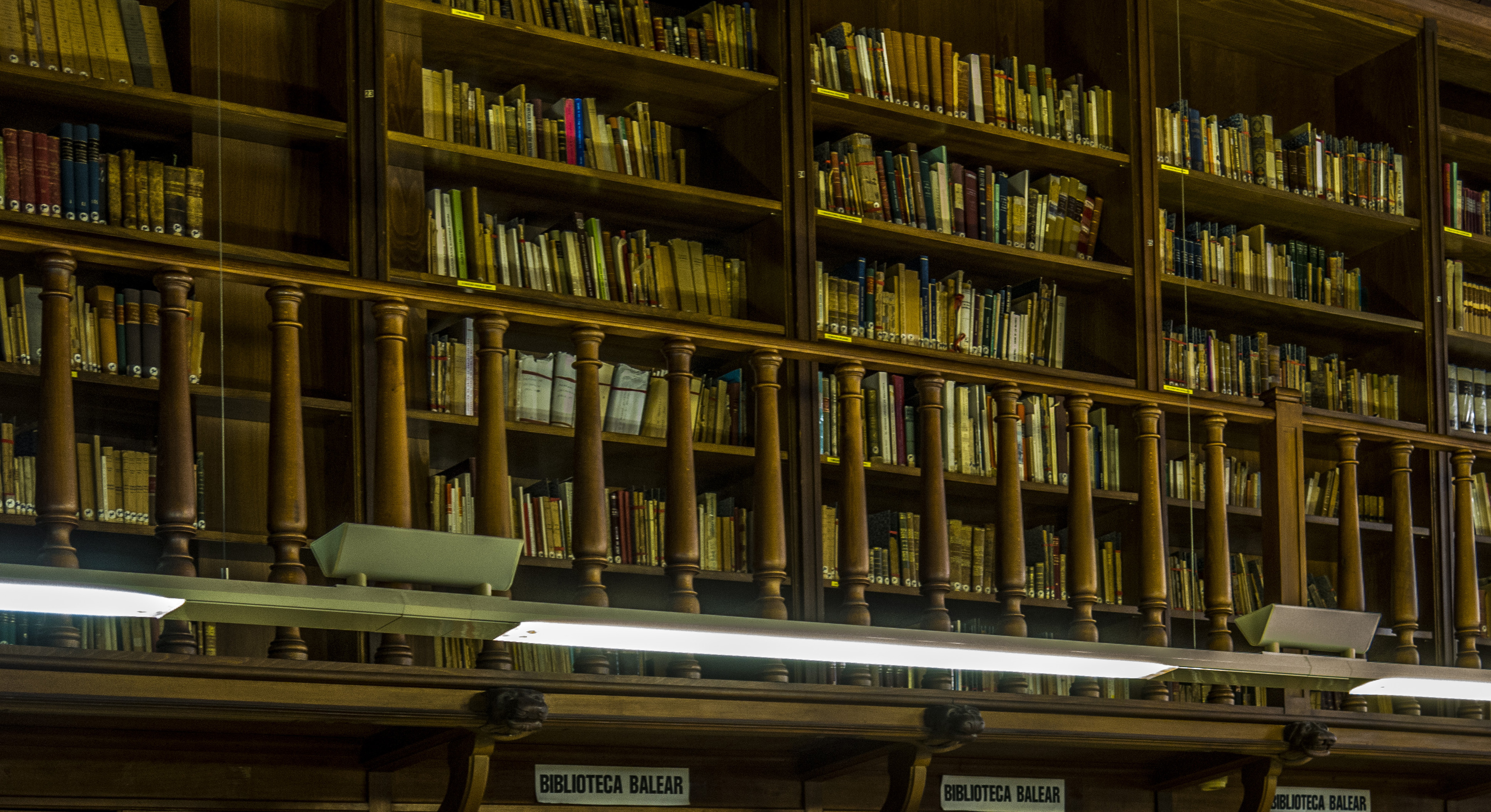 La biblioteca més important de l'Ajuntament de Palma que té la seu als baixos de l'ajuntament, a la plaça de Cort.